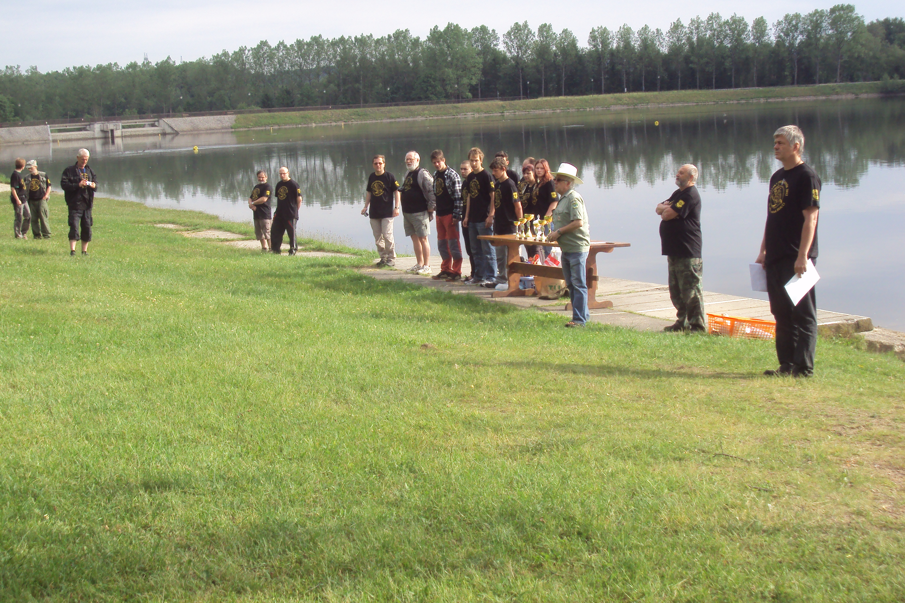 Vyhlašování výsledků soutěže Branná hra Cesta odhodlání 2012, pláž ve Stráži pod Ralskem, 36. ročník